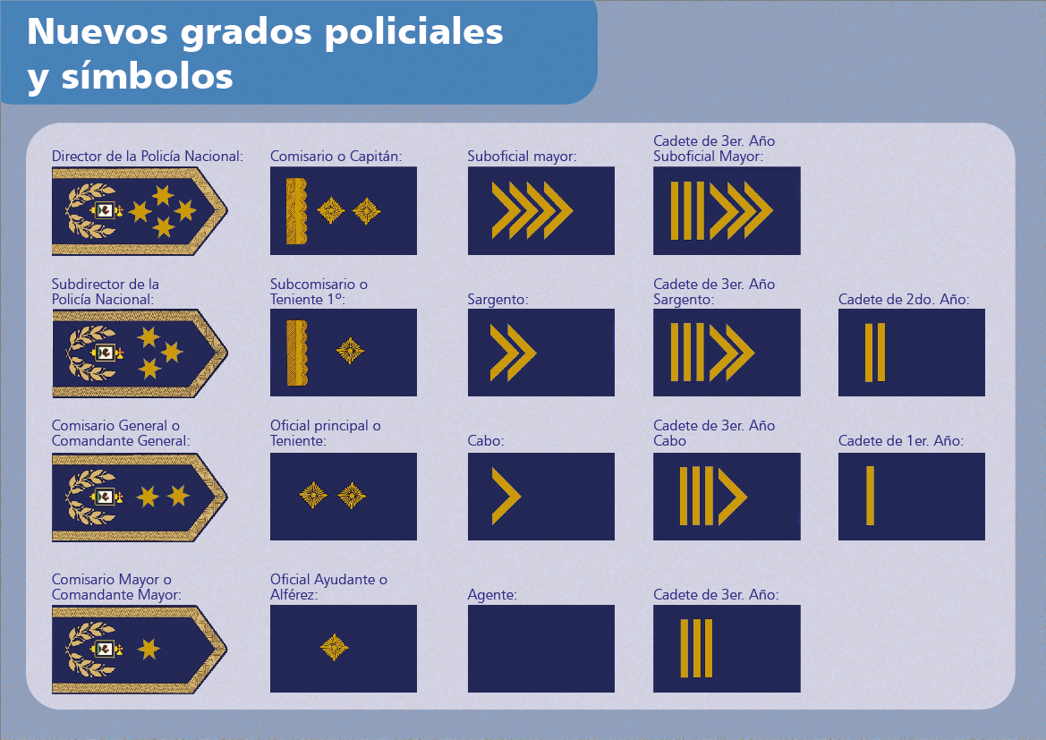 simbolos y grados de la policía nacional de uruguay.